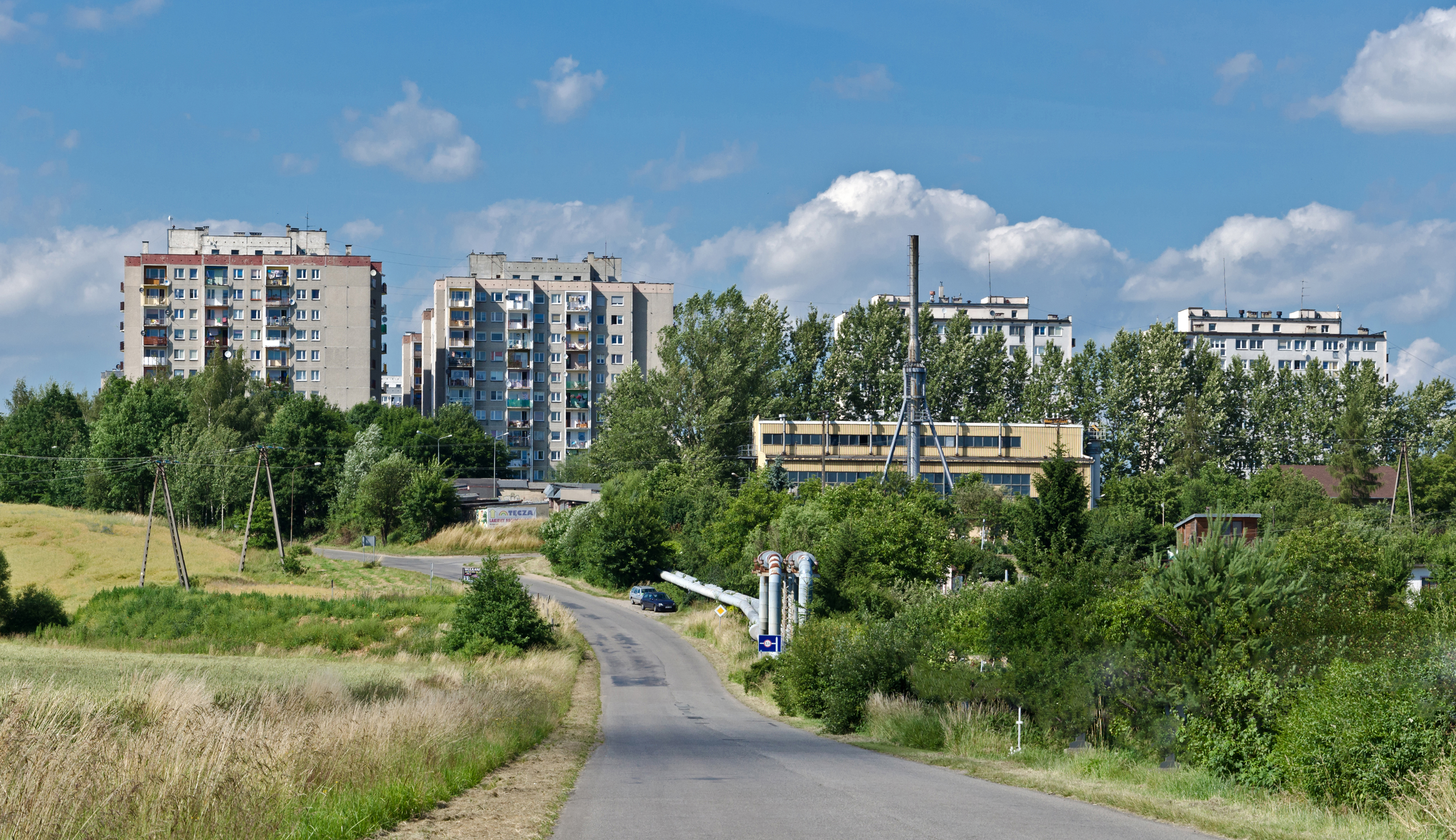 Kłodzko, ul. Objazdowa